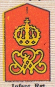 Achselklappe Mannschaften des Infanterie-Regiments „Kaiser Wilhelm, König von Preußen“ (2. Württ.) Nr. 120, Garnisonː Ulm.